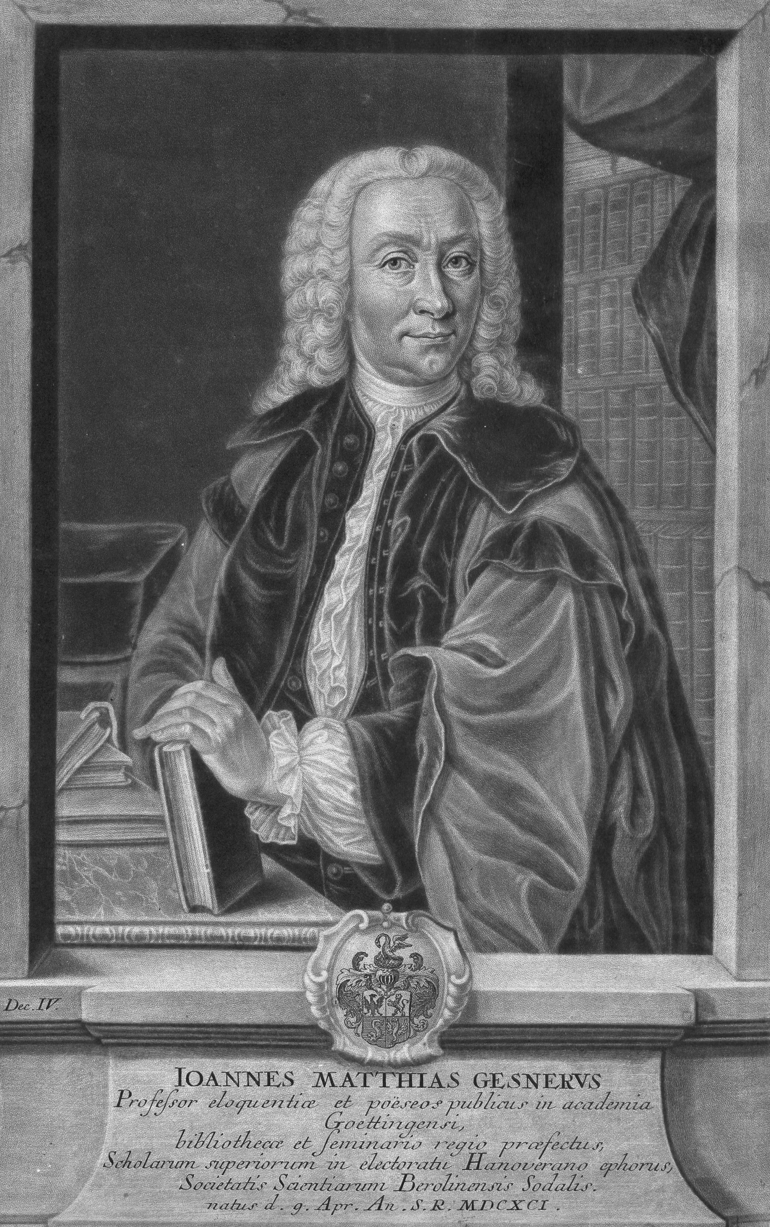 Johann Matthias Gesner, German scholar